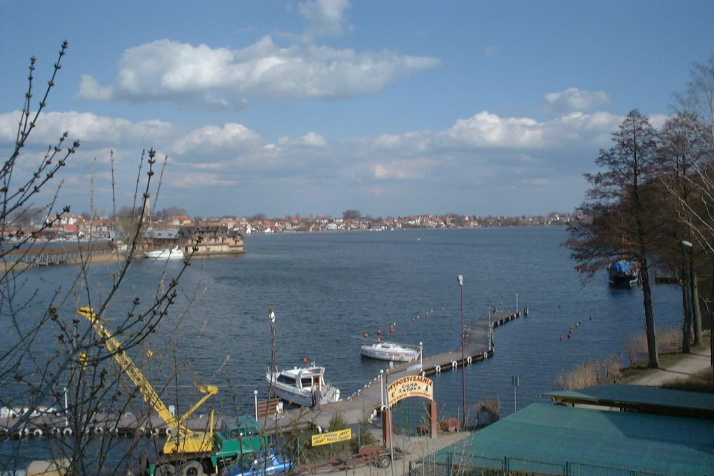 Mikolajskie Lake, view from Mikolajki